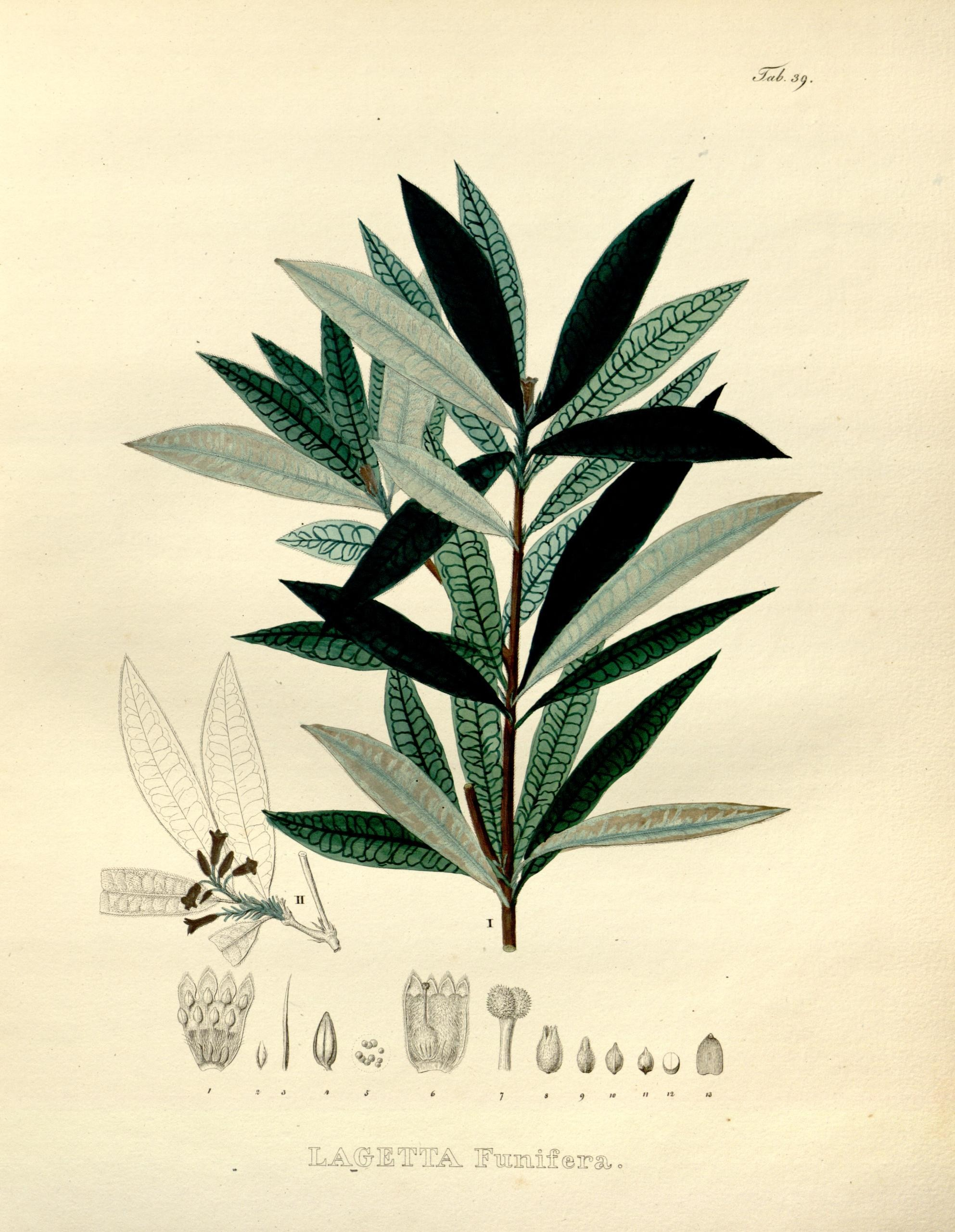 Lagetta funifera = Funifera utilis Nova genera et species plantarum. Monachii [Munich] :Impensis Auctoris,1824-1829 [i.e. 1824-32]..